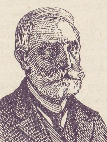 Gyula Vargha, Hungarian poet